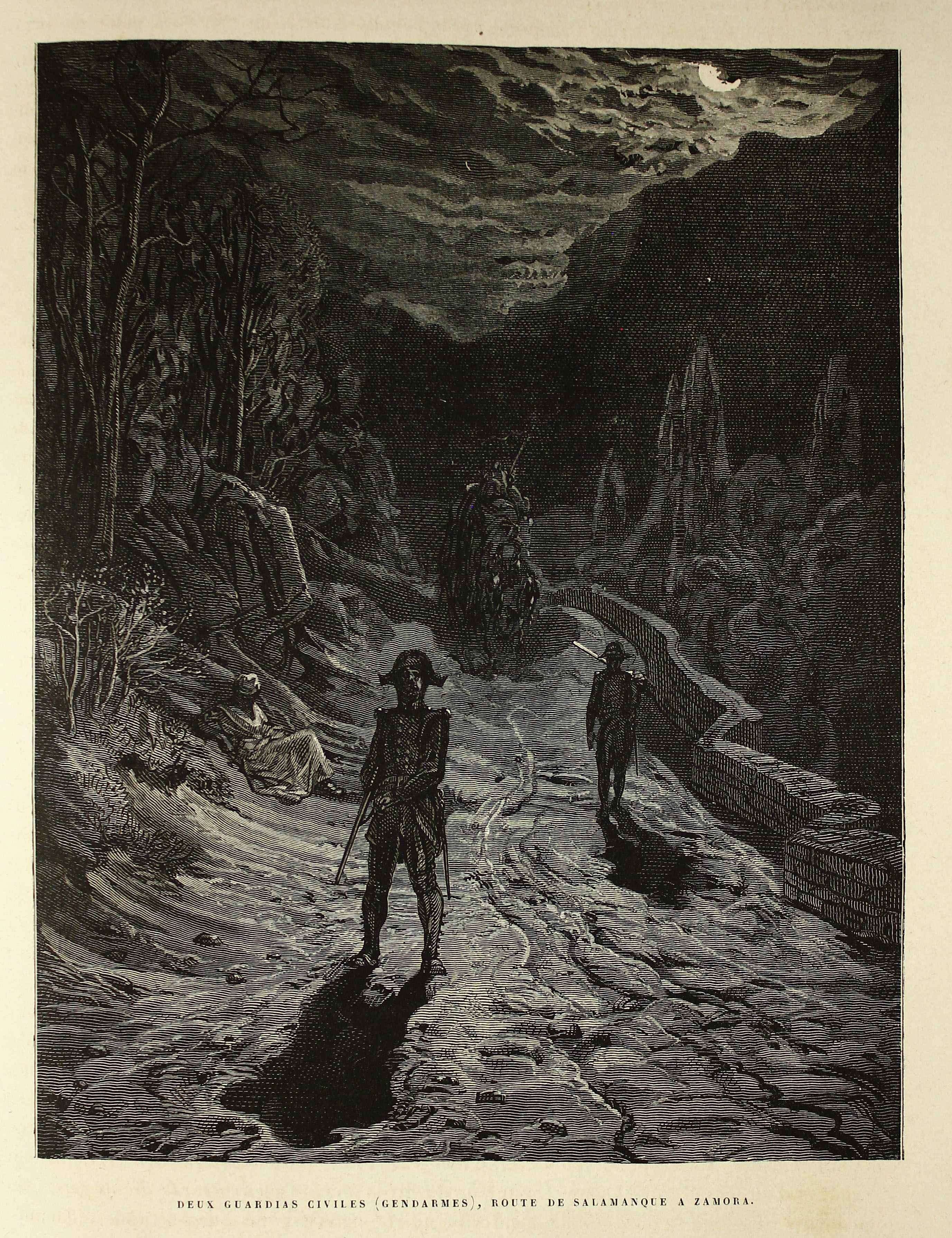 Autor: Davillier, Jean Charles, barón, 1823-1883 Descripción bibliográfica: L'Espagne / par Le Baron CH. Davillier ; ilustrée de 309 gravures dessinées su bois par Gustave Doré. - Paris : Librairie Hachette, 1874. - 799 p. : il. Materia: España- Geografía Materia: España- Usos y costumbres Ilustrador: Doré, Gustave, 1832-1883 Editor: Libreria Hachette Lugar de impresión: Francia, París Localización: Libro completo